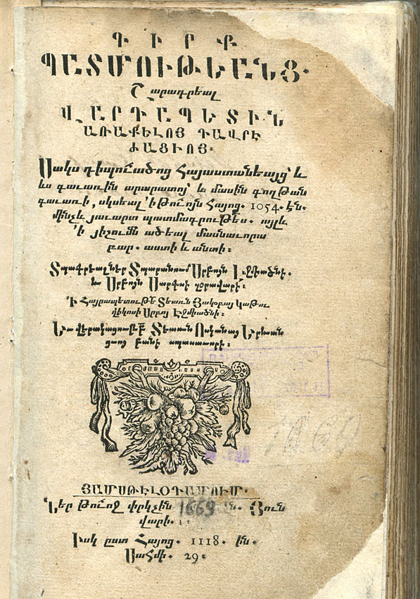 Arakel Davrizhetsi. History of Armenia – Аmsterdam: Voskan Yerevanci Press, 1669.